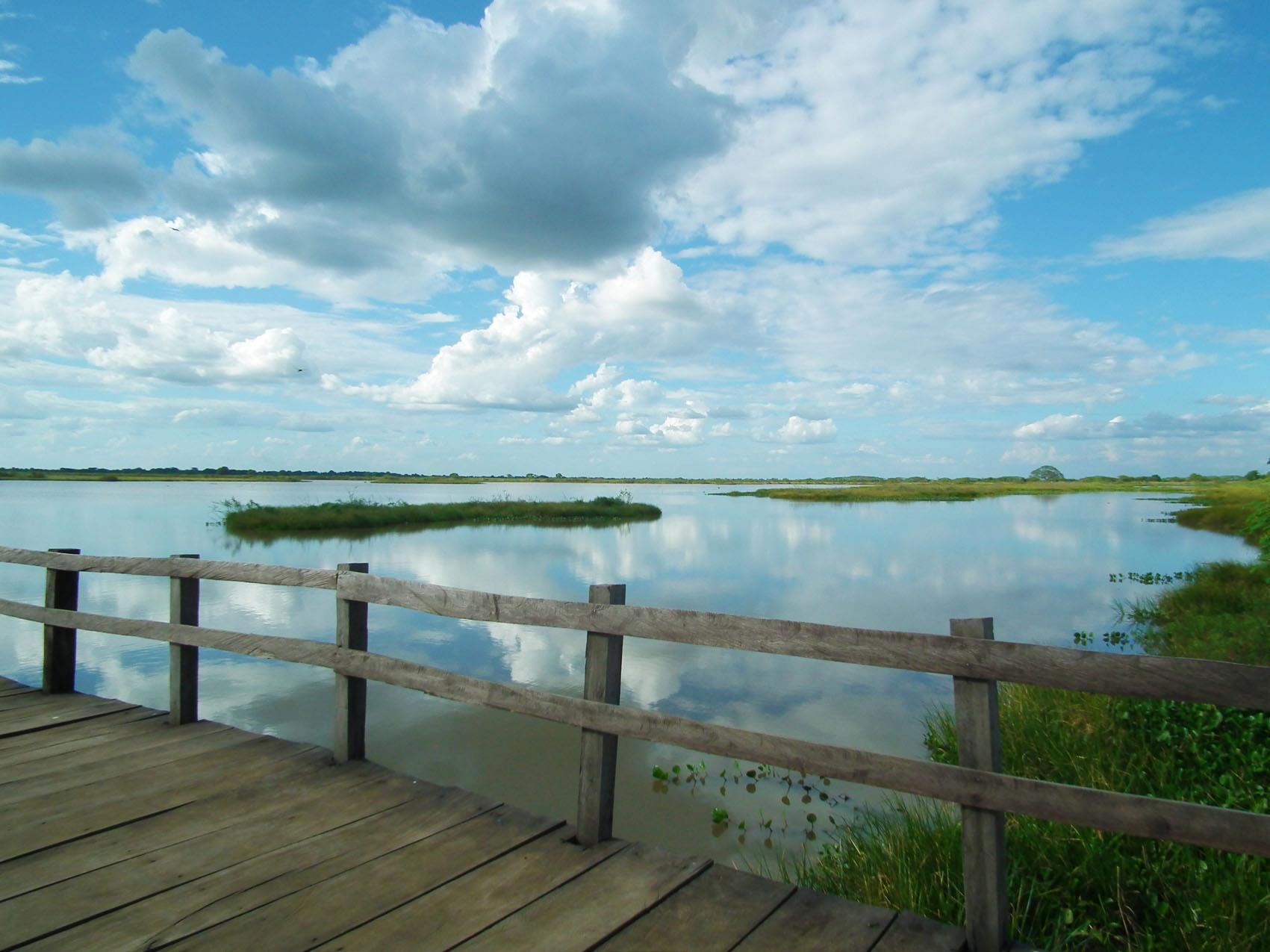 En este sector funciona la Reserva de Fauna Silvestre Esteros de Camaguán que fue el 9 de marzo del 2000, por medio de Gaceta Oficial. Esta reserva se encuentra ubicada entre el Municipio Sebastian Francisco de Miranda y Camaguán, con una superficie de 19 mil300 hectáreas aproximadamente. Los esteros de Camaguán constituyen una zona anegadiza sometida a un régimen estacional. La precipitación promedio anual es de 1600 mm. y la temperatura es de 27 ºC.